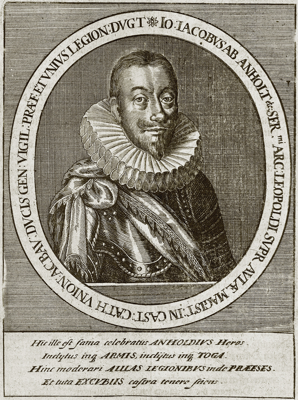 Porträt des Feldmarschalls Johann Jakob von Brockhorst-Batenburg aus dem ersten Band von Matthäus Merians Theatrum Europaeum